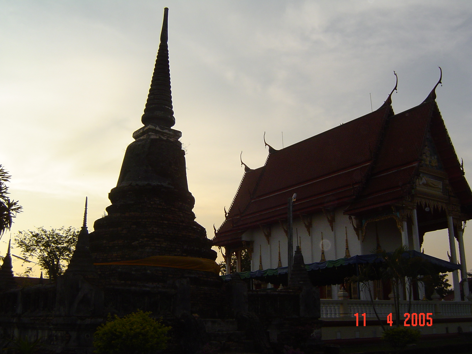 วัดทองทั่ว Thongthua Temple